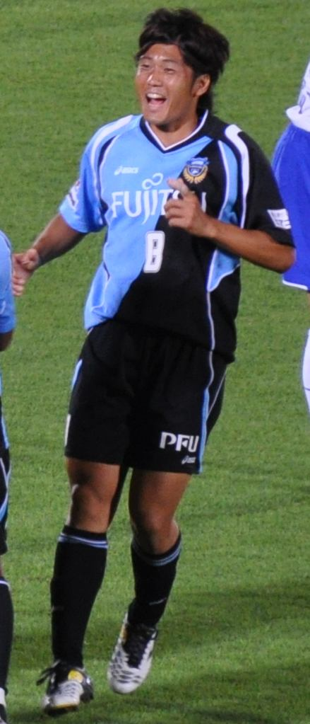 Takanobu Komiyama - 2